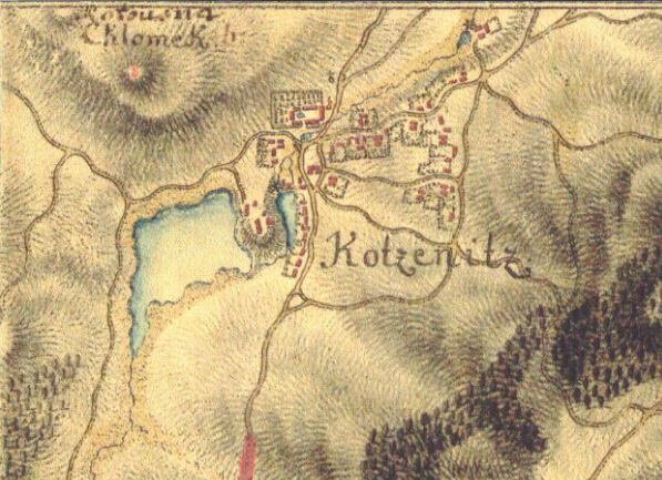 stará mapa